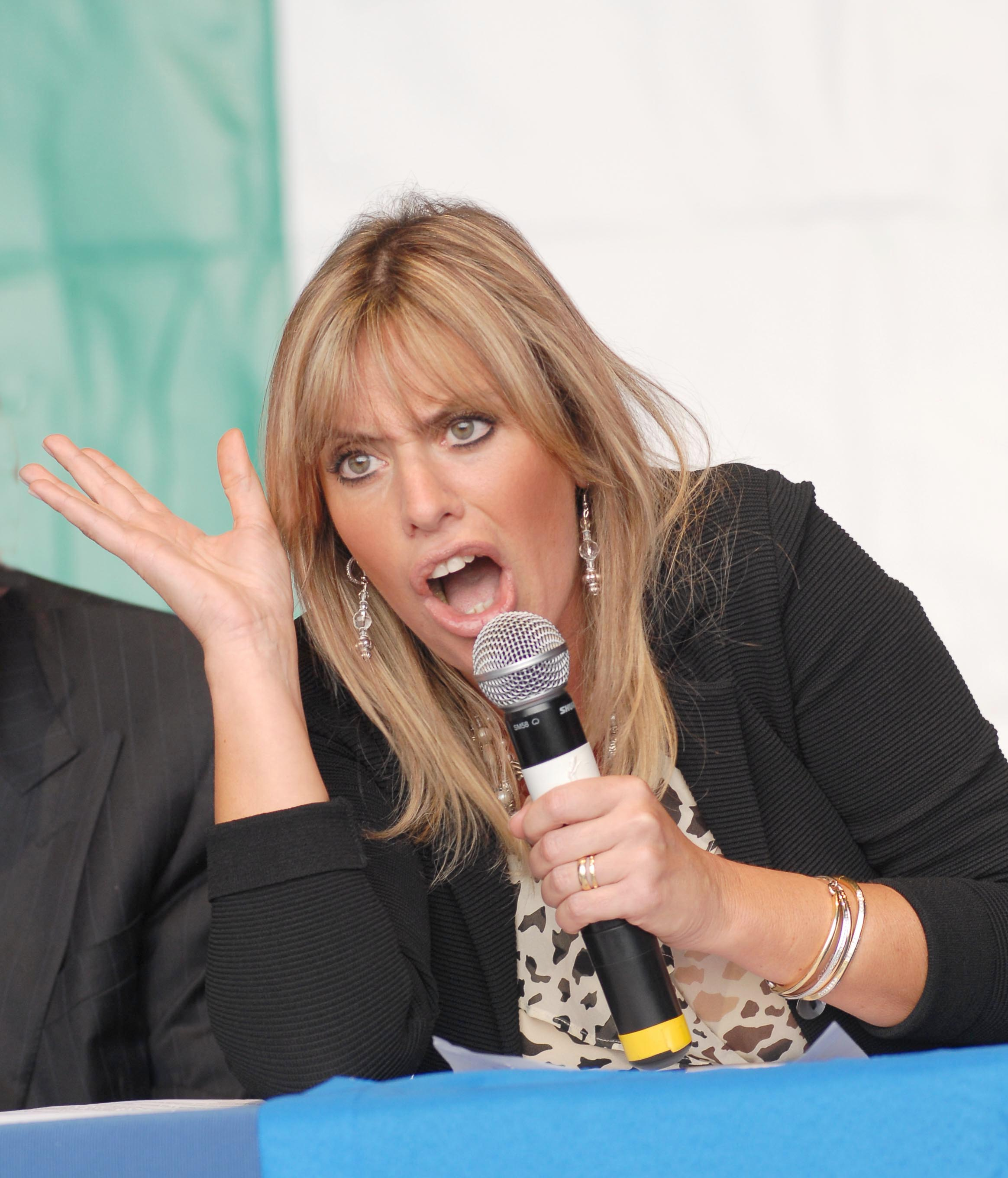 Alessandra Mussolini, Italian conservative politician, member of the European Parliament, former actress and model, granddaughter of Benito Mussolini, niece of Sophia Loren. Foto Nicoloro Giuseppe. Milano 07/10/2007 Festa Tricolore del secolo d' Italia. nella foto l' onorevole Alessandra Mussolini.